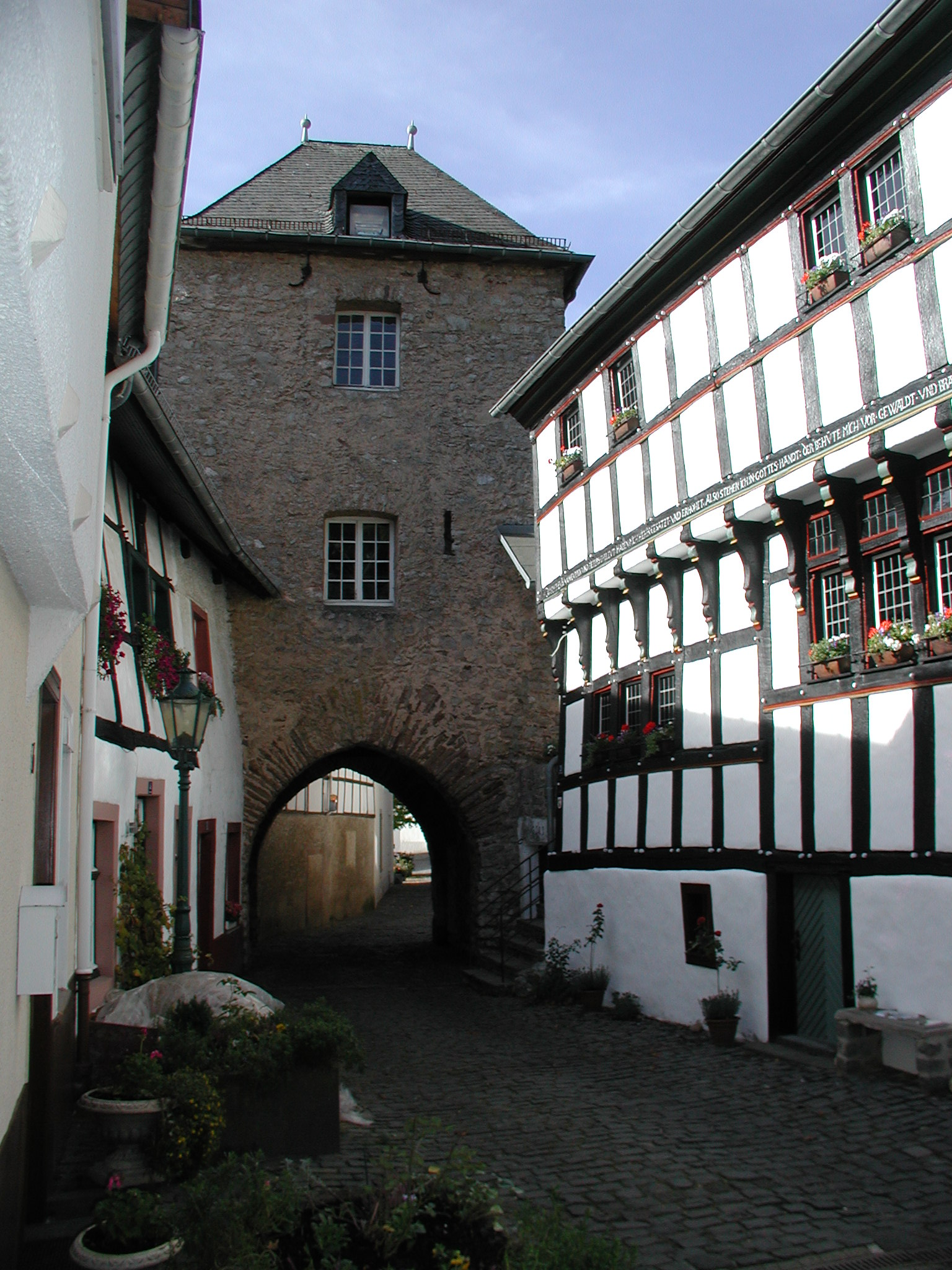 Blankenheim - Ahr